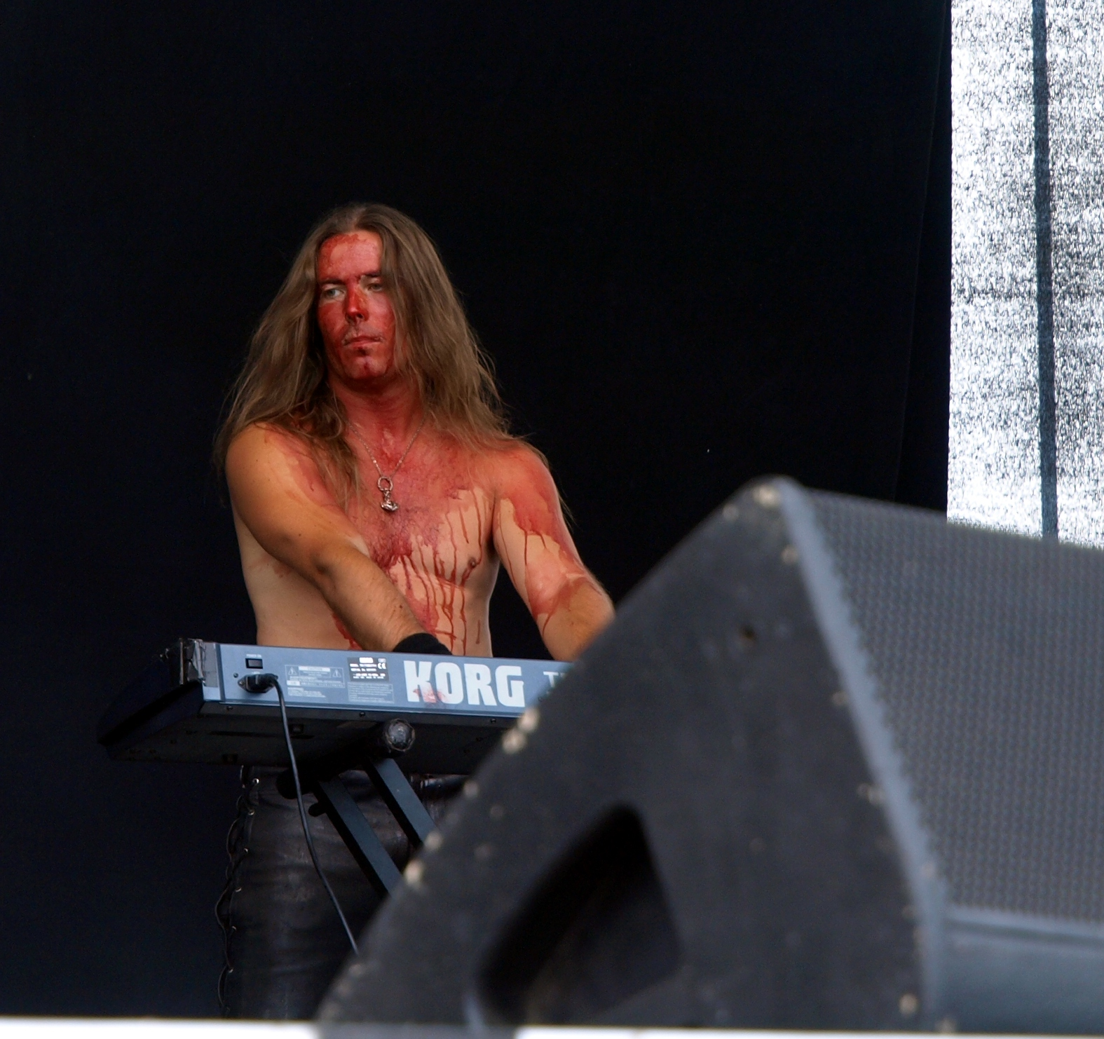 Moonsorrow live am Myötätuulirock 2011